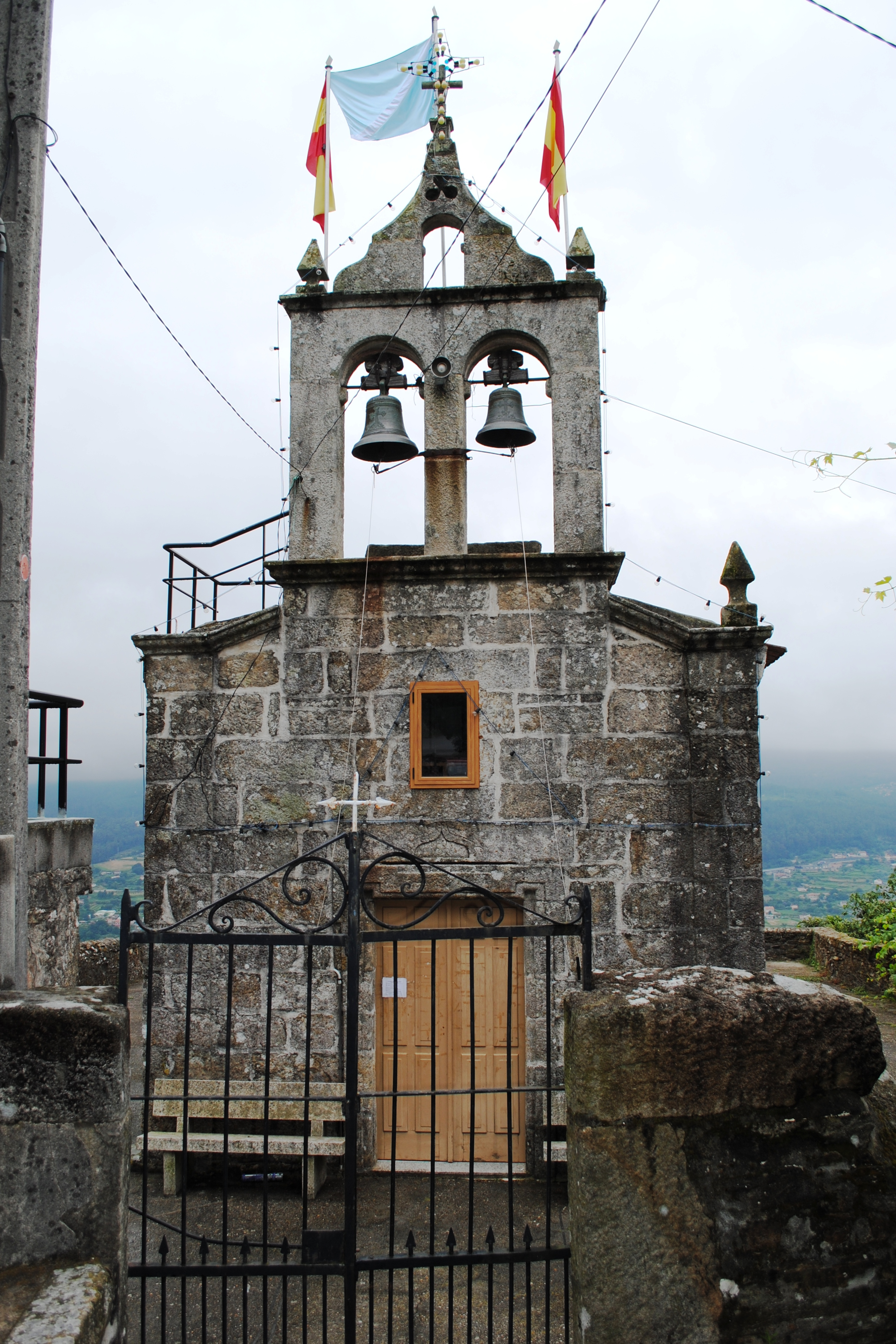 Igrexa Cabeiro, Redondela.